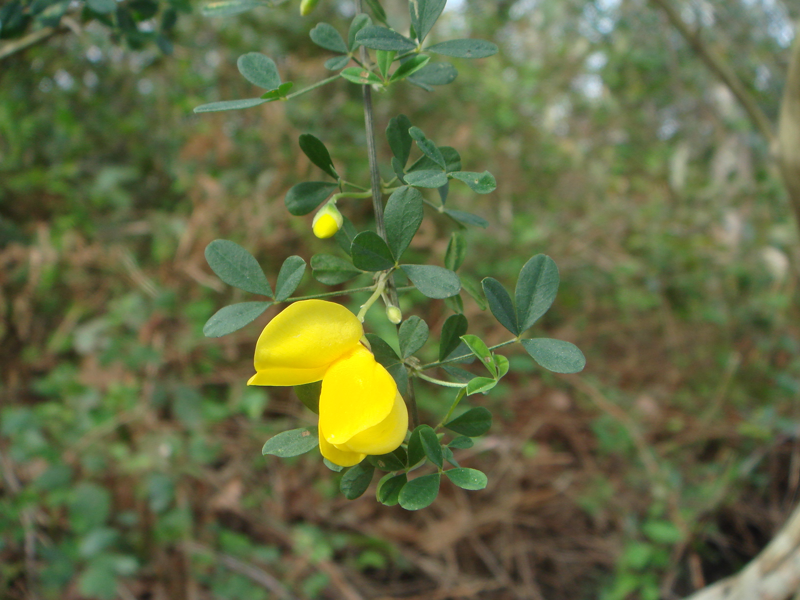 Piorno andaluz (Cytisus arboreus subsp. baeticus (Webb) Maire). Ceuta España